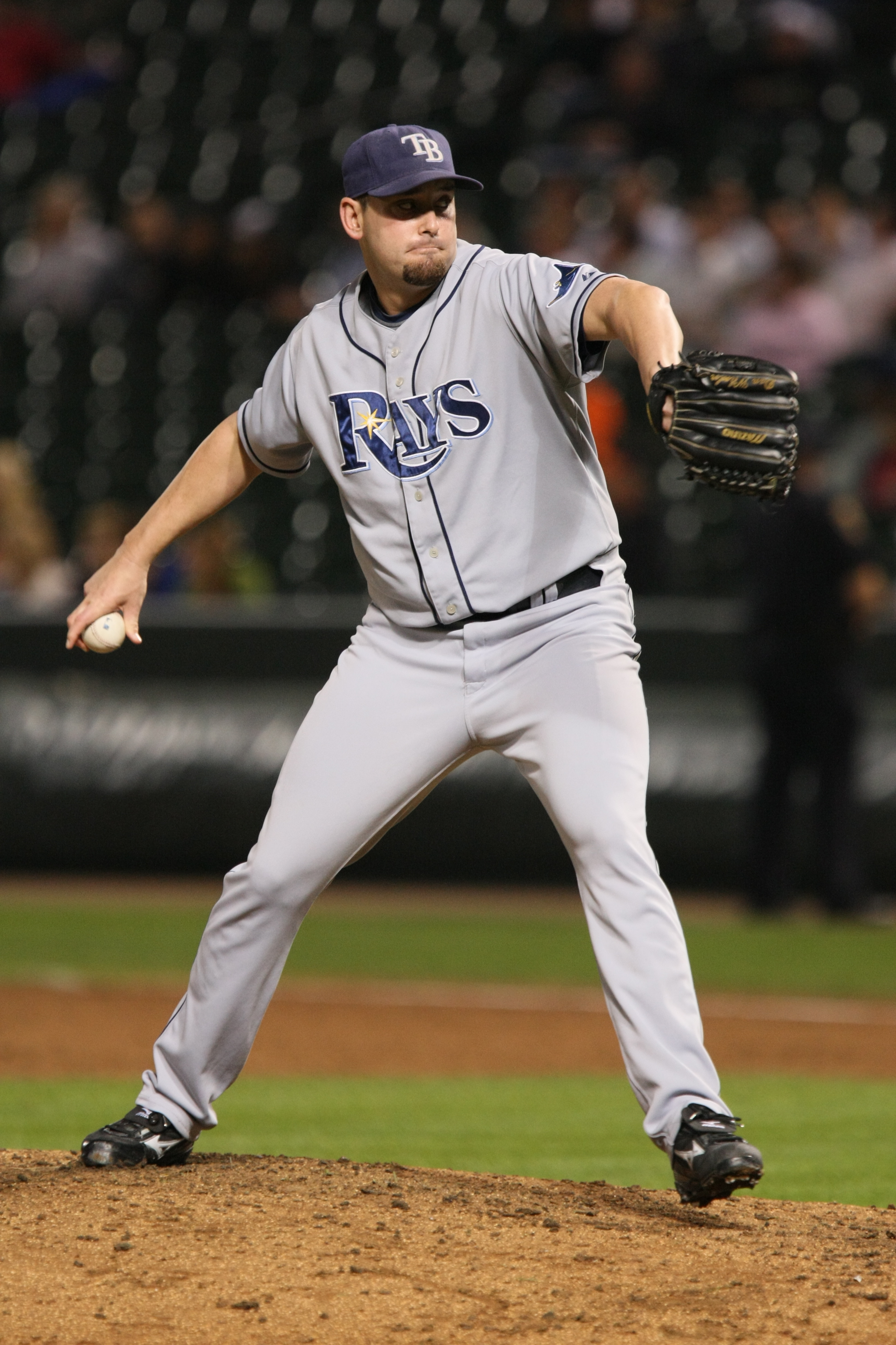 Dan Wheeler